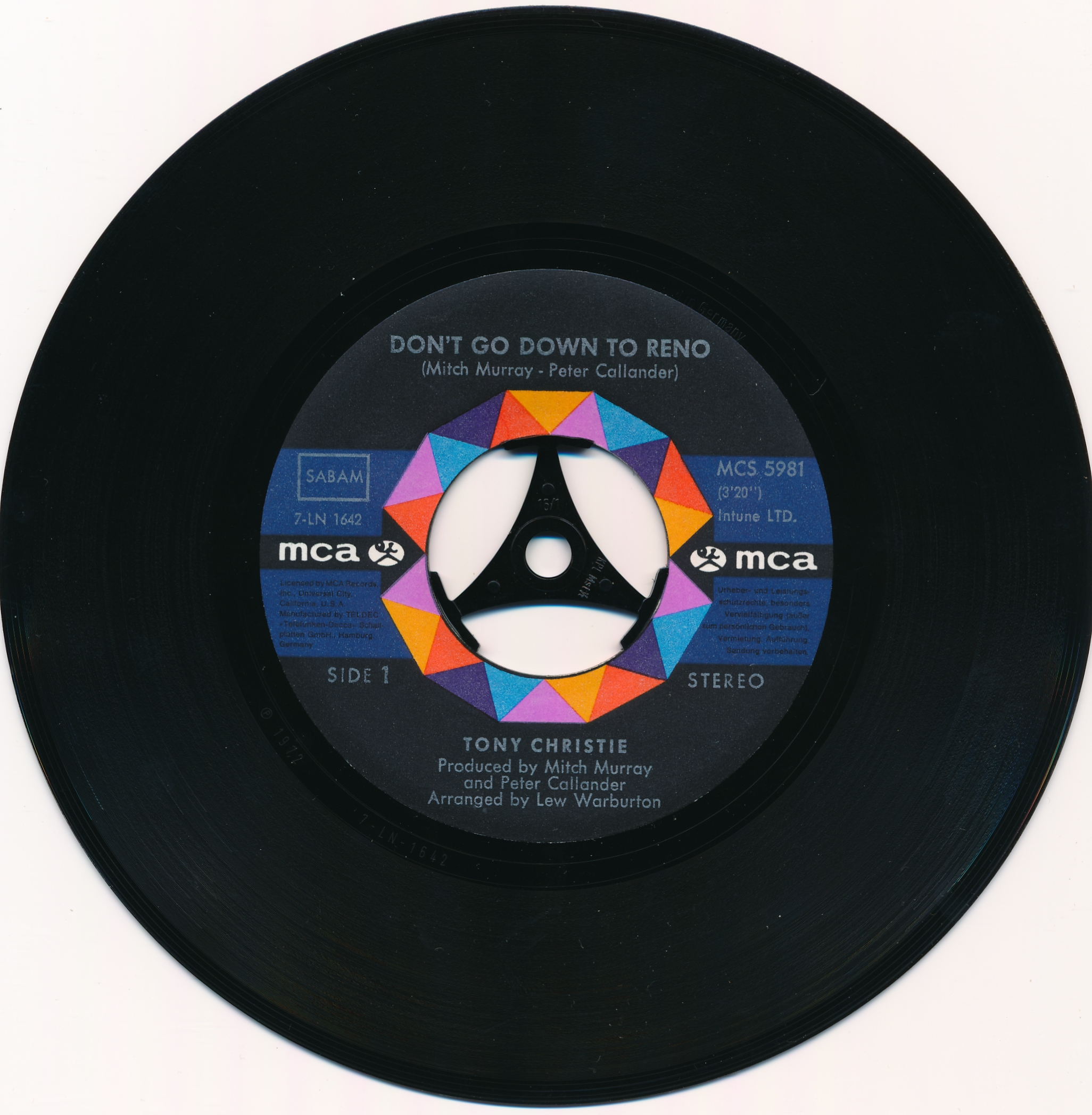 Single-Schallplatte der Music Corporation of America